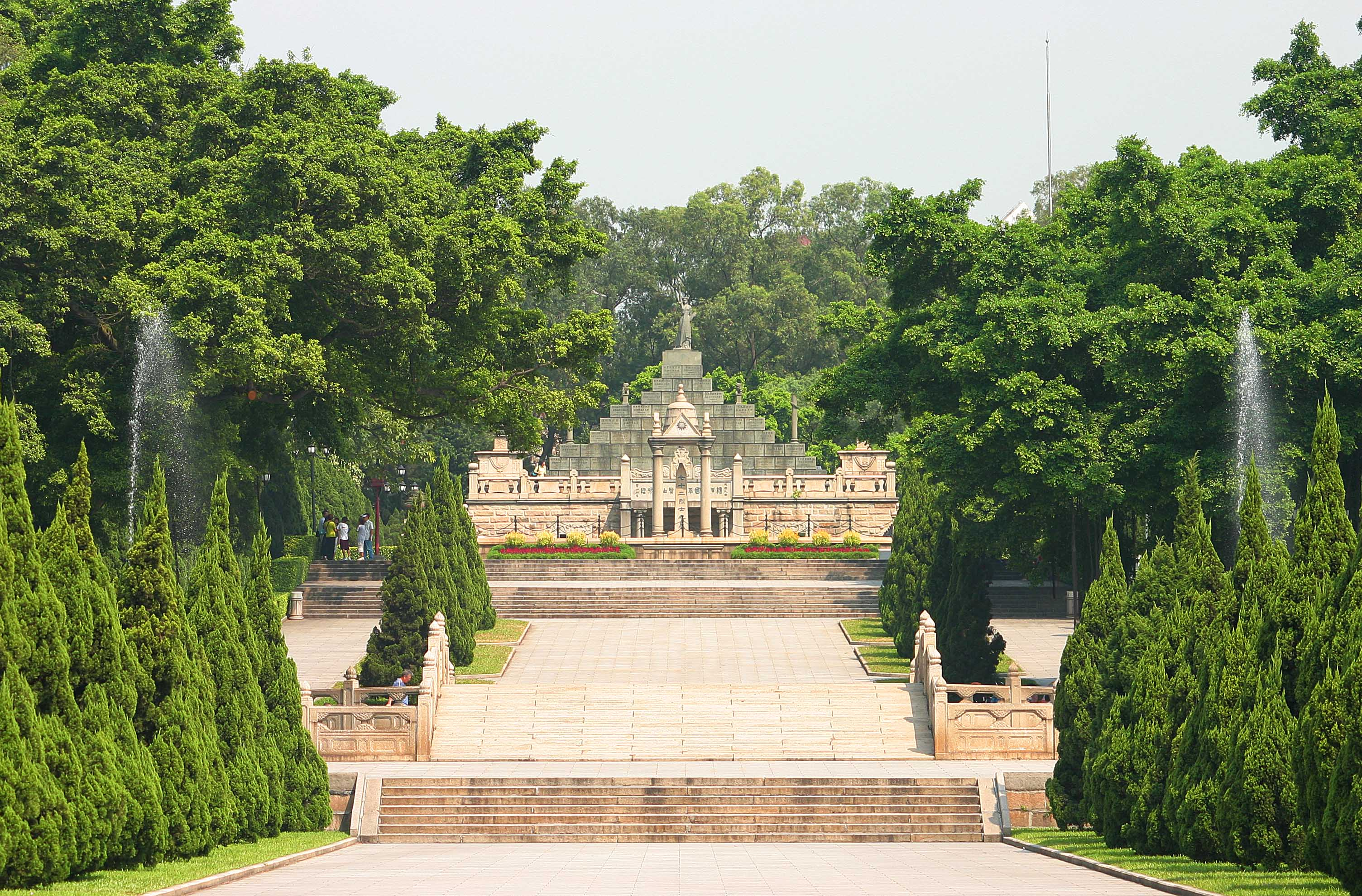 黄花岗h